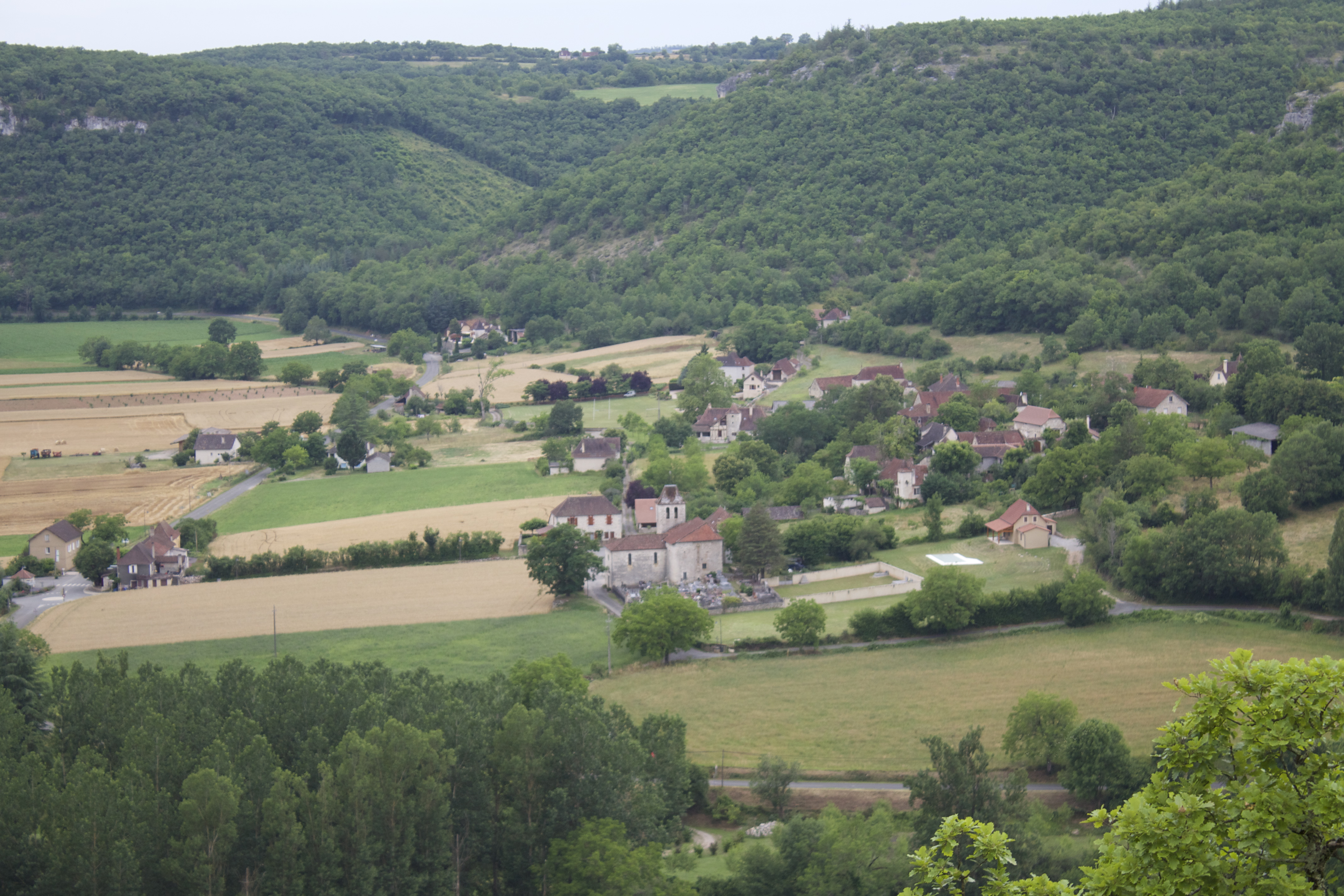 Brengues